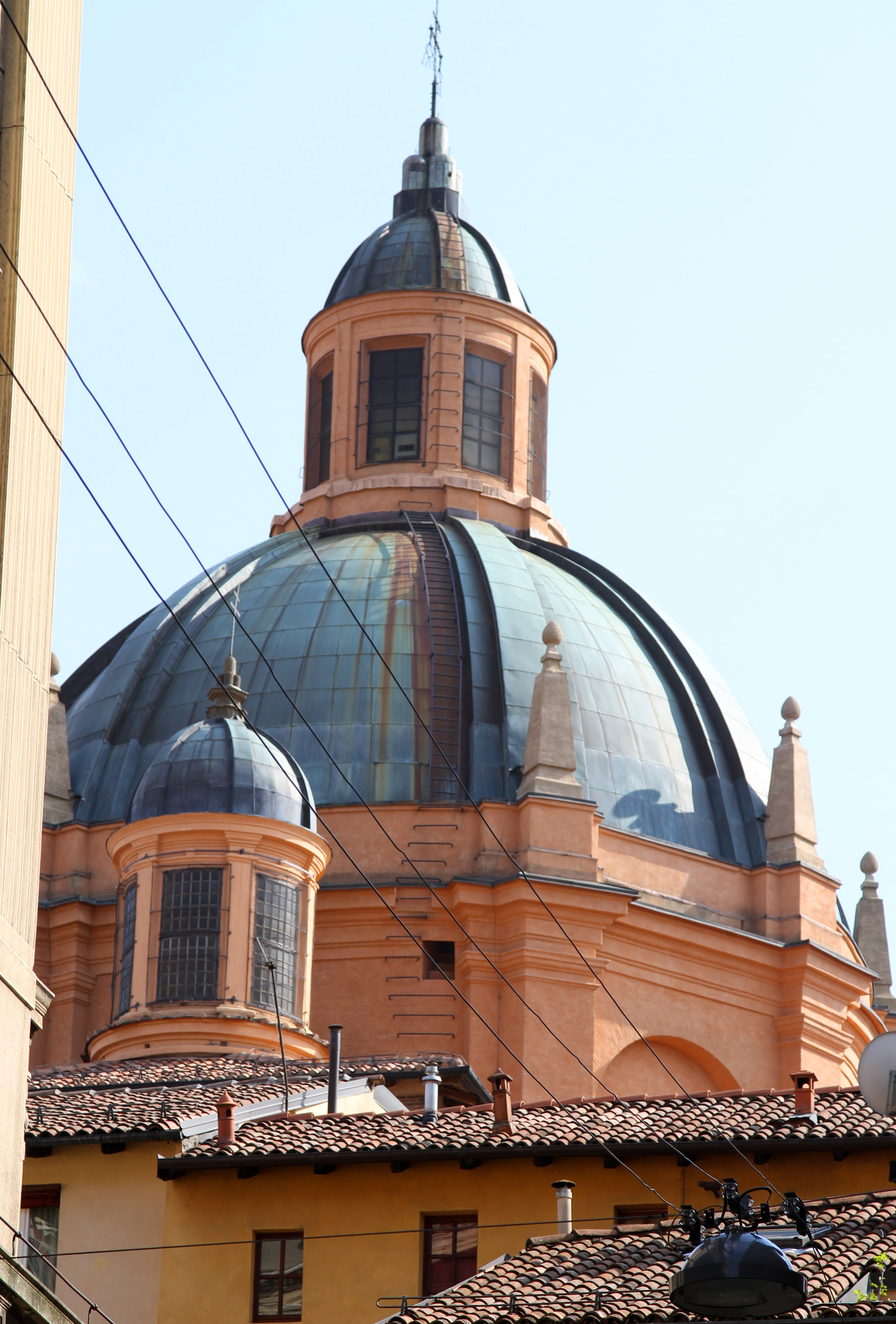 Cupola di Santa Maria della Vita